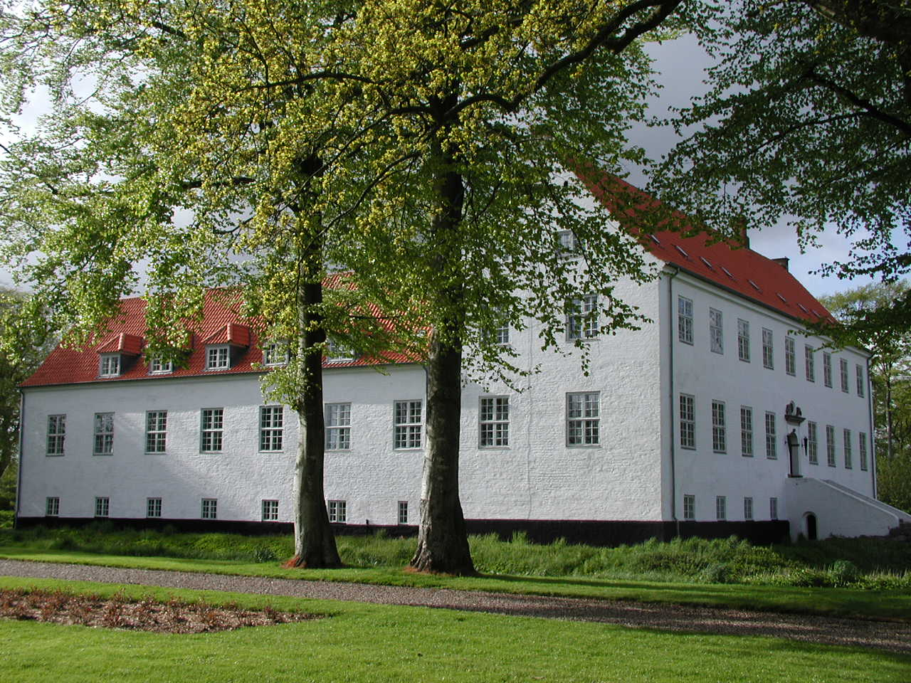 Riber Kjærgaard